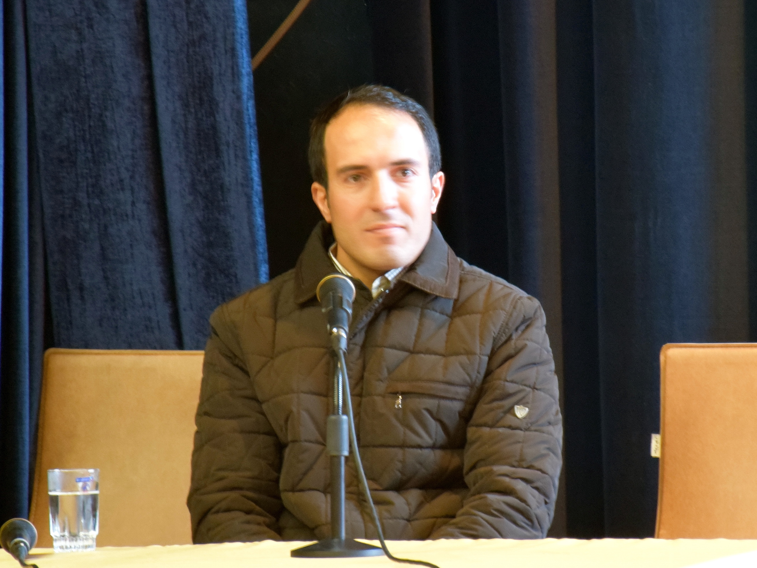 عظیم قیچی‌ساز در گزارش صعود به اورست- آذر ۹۵- سالن شهید قندی وزارت ارتباطات و فناوری اطلاعات